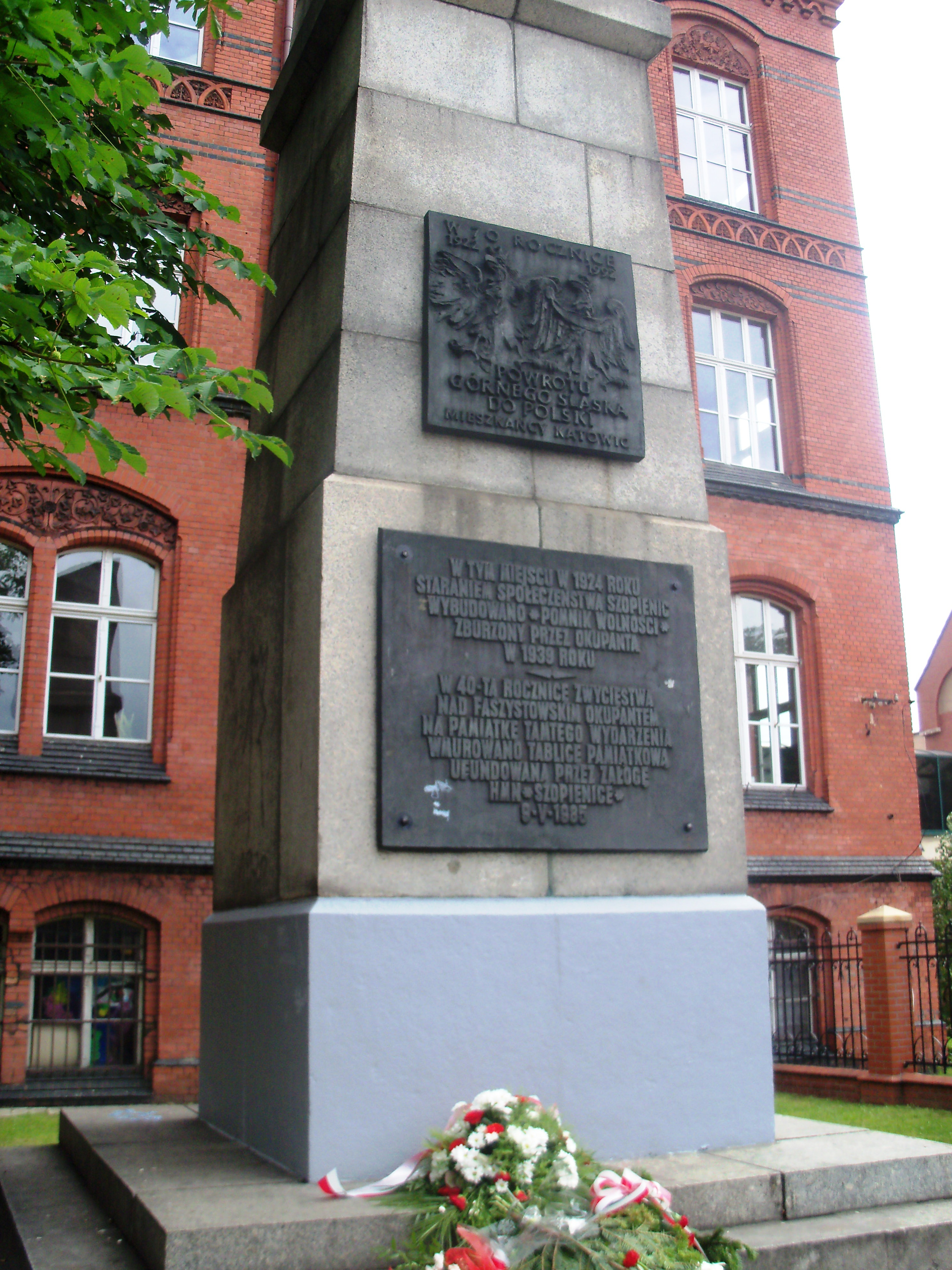 Pomnik Wolności - Powstańców Śląskich w Katowicach-Szopienicach, przy pl. Powstańców Śląskich, obok gmachu Liceum Ogólnokształcącego im. J. Długosza